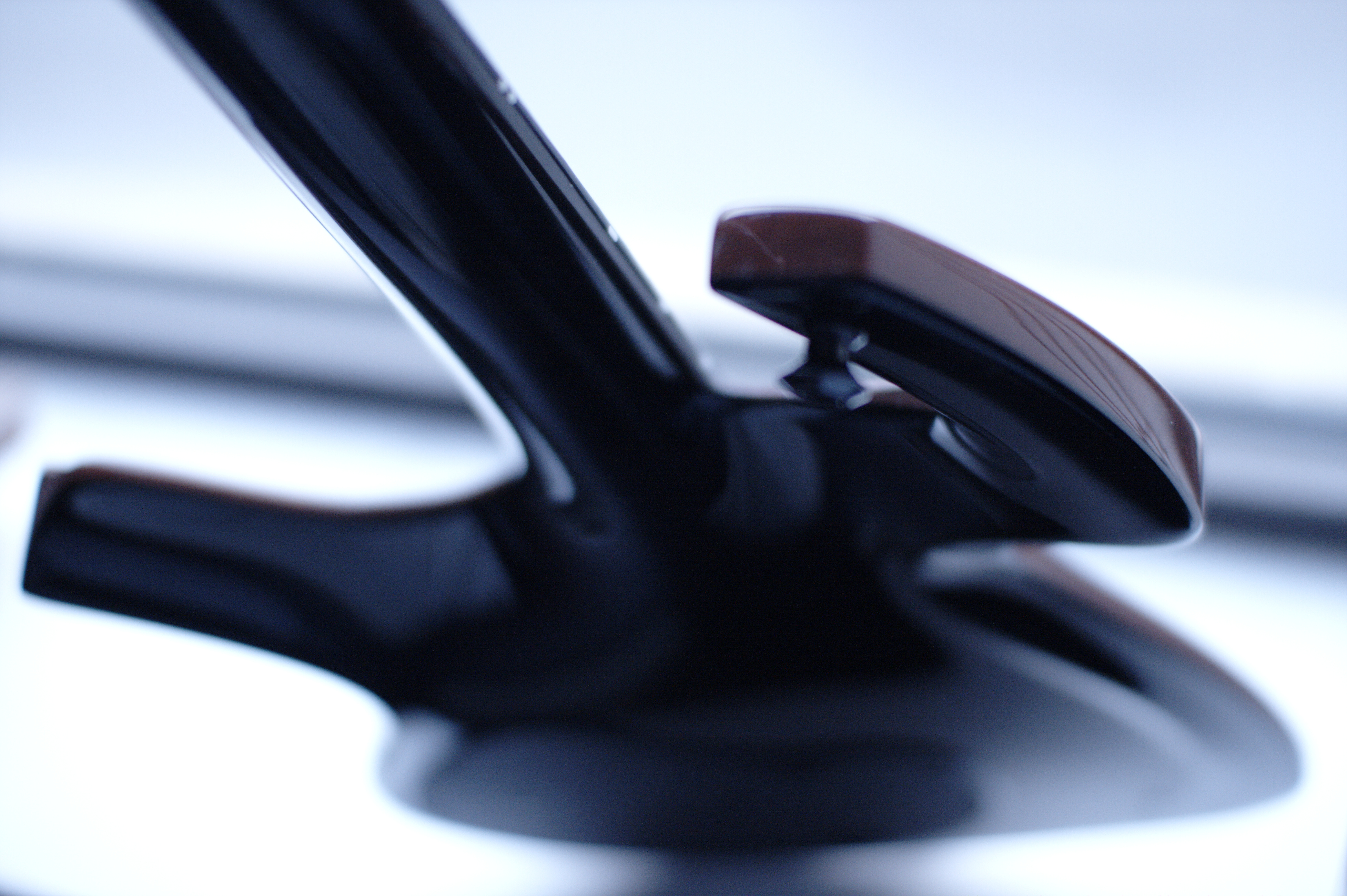 Parker NiteFly-M (2008)